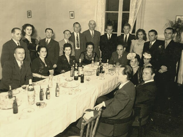 Polacos celebrando la janucá en Costa Rica.